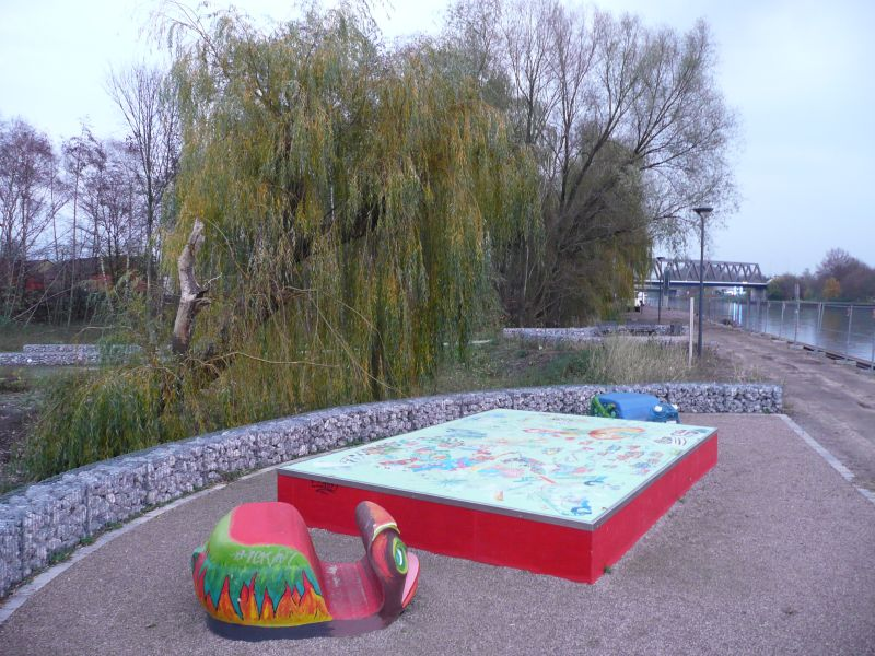 Rastplatz am KulturKanal